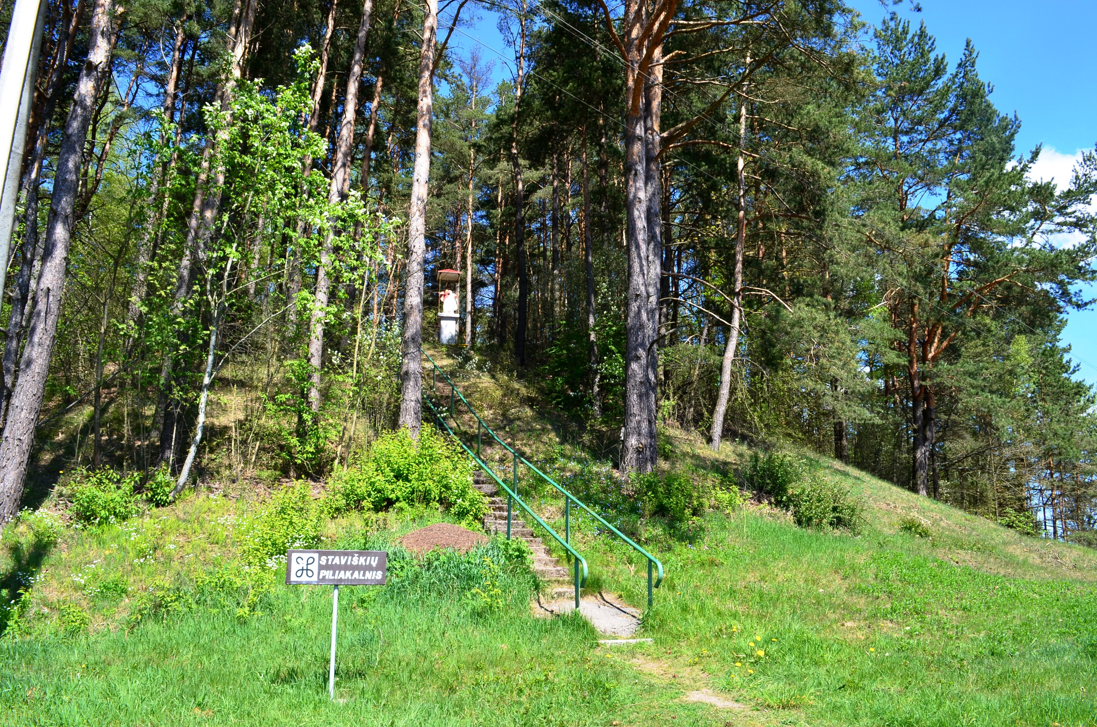 Staviškių piliakalnis, Verkių sen., Vilnius